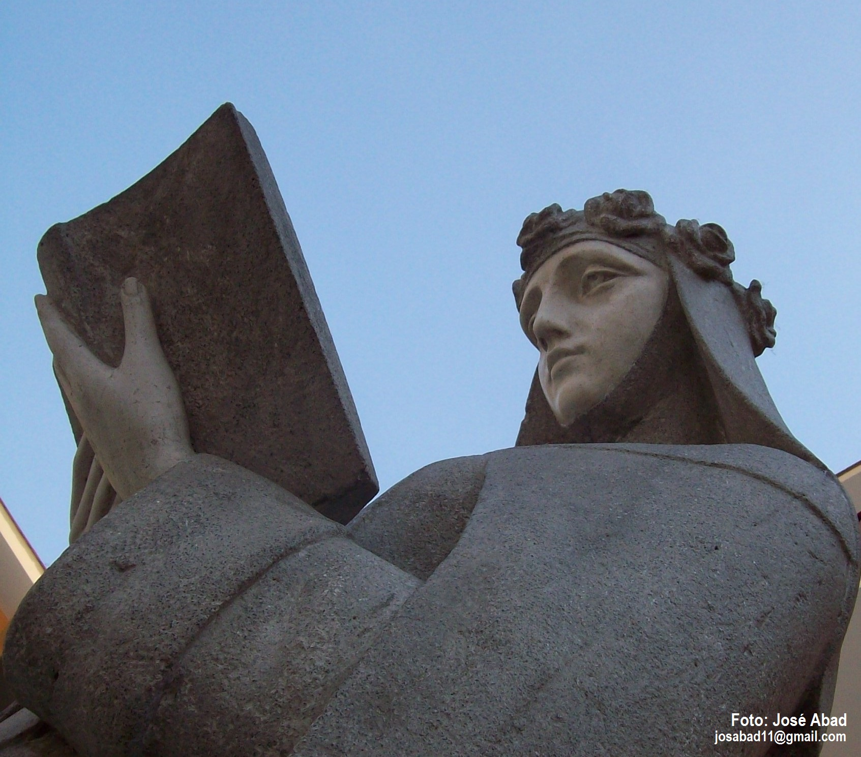 Estatua de **Santa Rosa de Lima** en el colegio "Rosa de Santa María", ubicado en el Jirón Carhuaz, Breña.